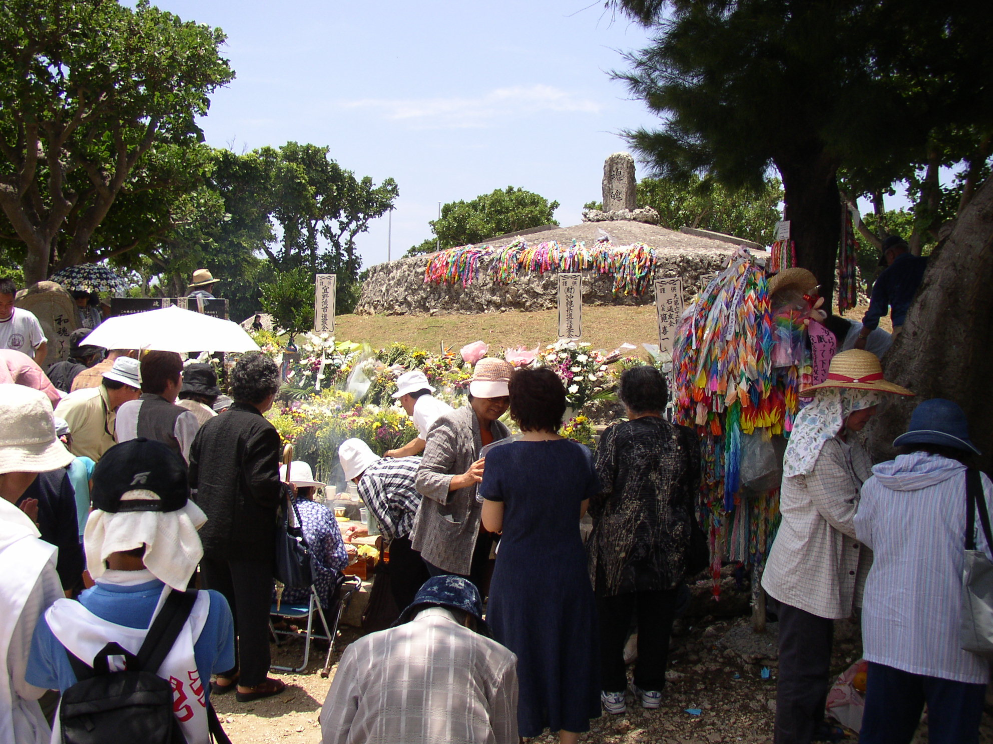 6月23日の魂魄の塔